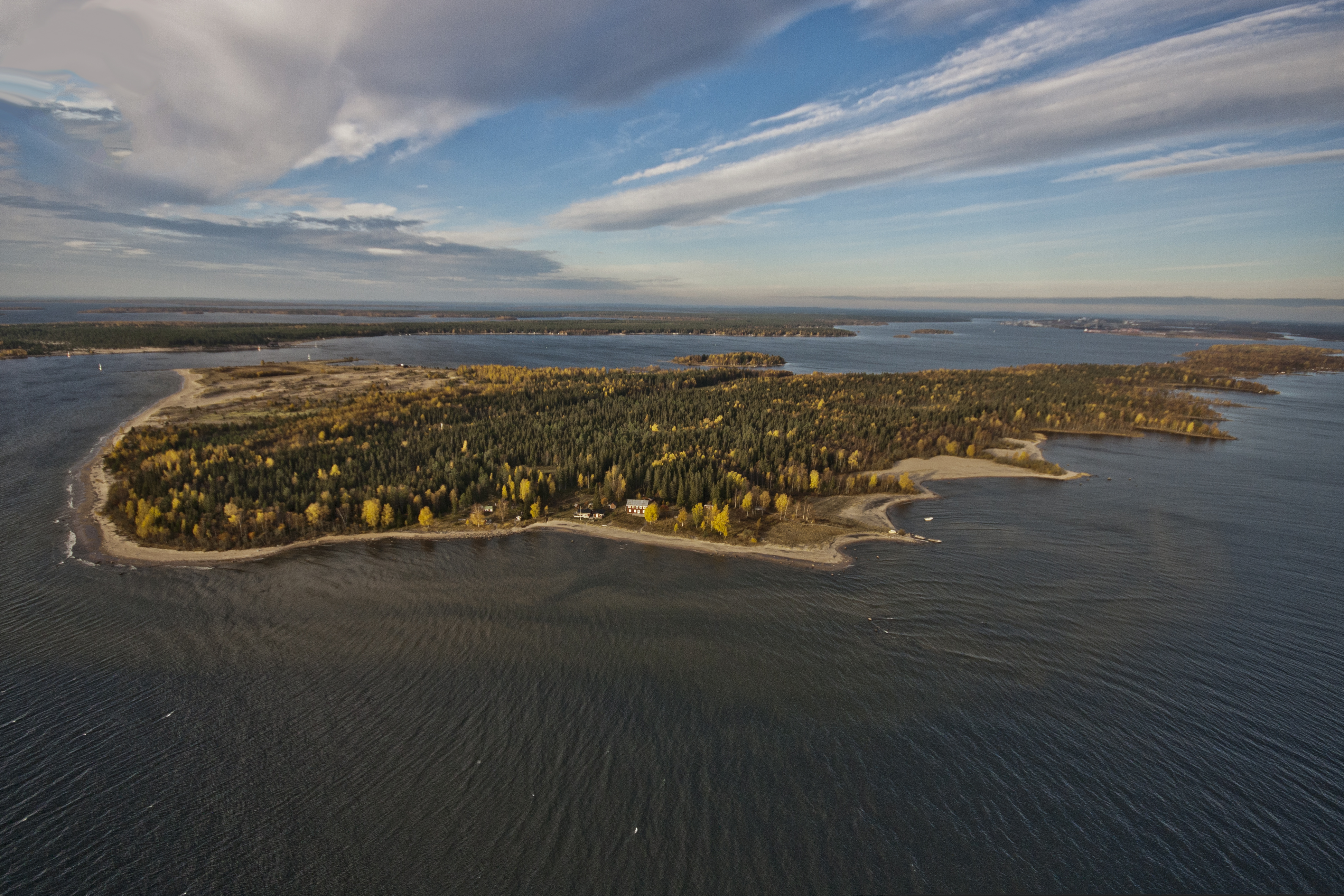 Ön Likskär i Luleå skärgård, med Sandön i bakgrunden.